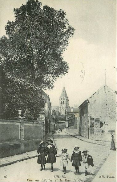 Thiais.Eglise et rue de Grignon